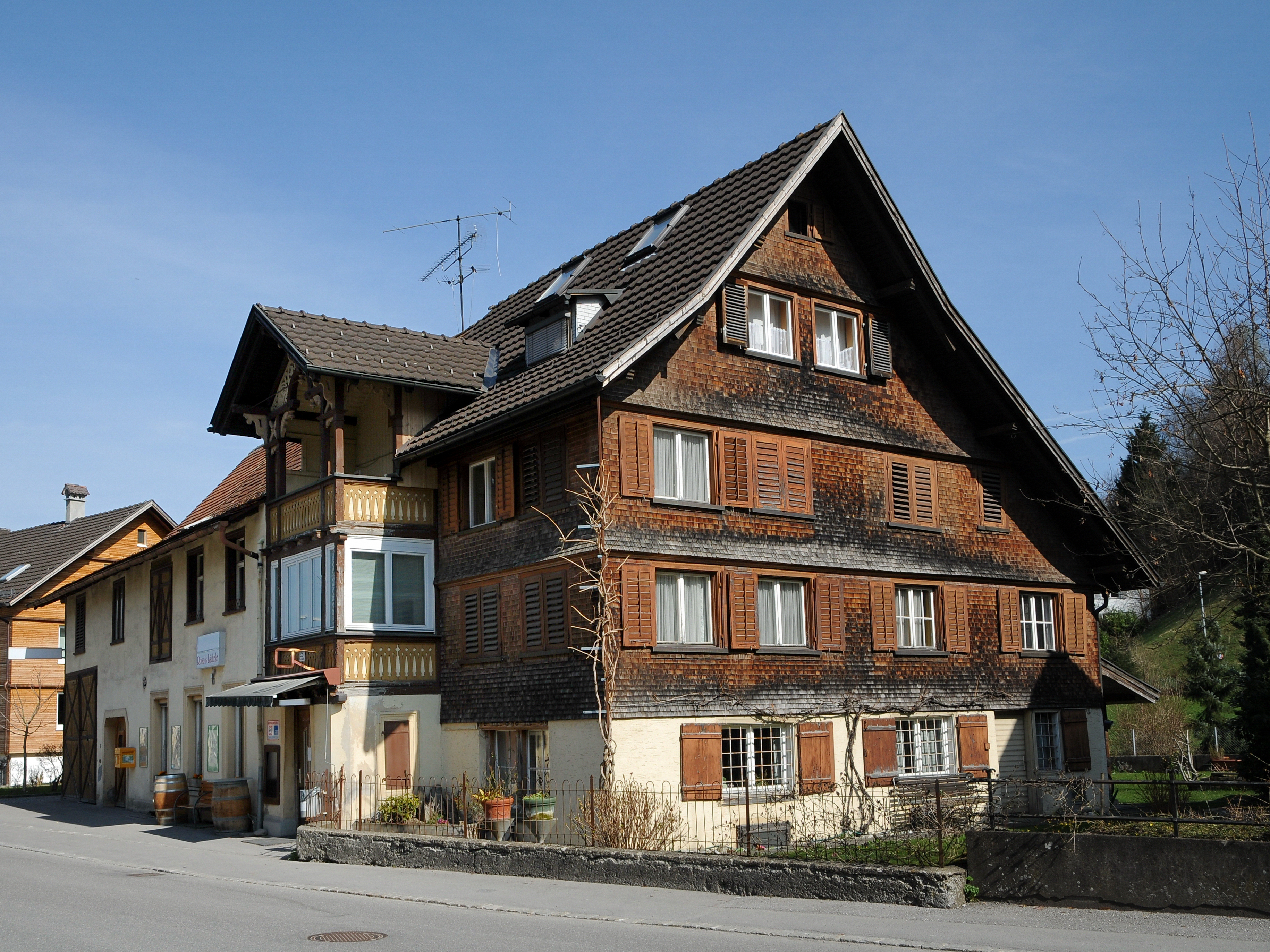 Vordere Achmühler Straße Nr.25 Rosa's Lädele im Oberdorf von Dornbirn. Haustyp: Rheintalhaus.